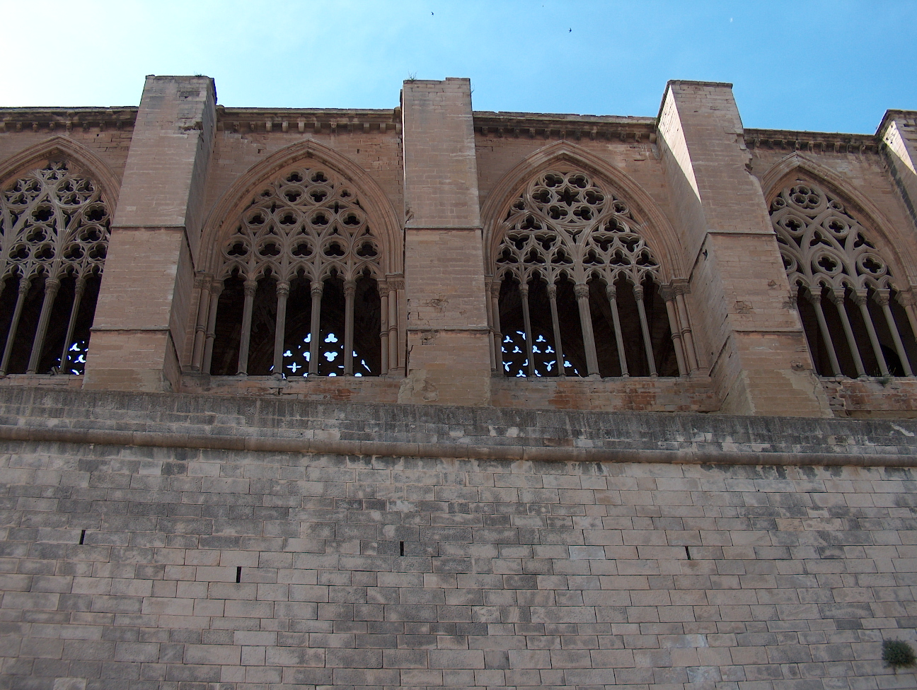 Sé Velha de Lérida. Sé Velha de Lérida em Espanha.